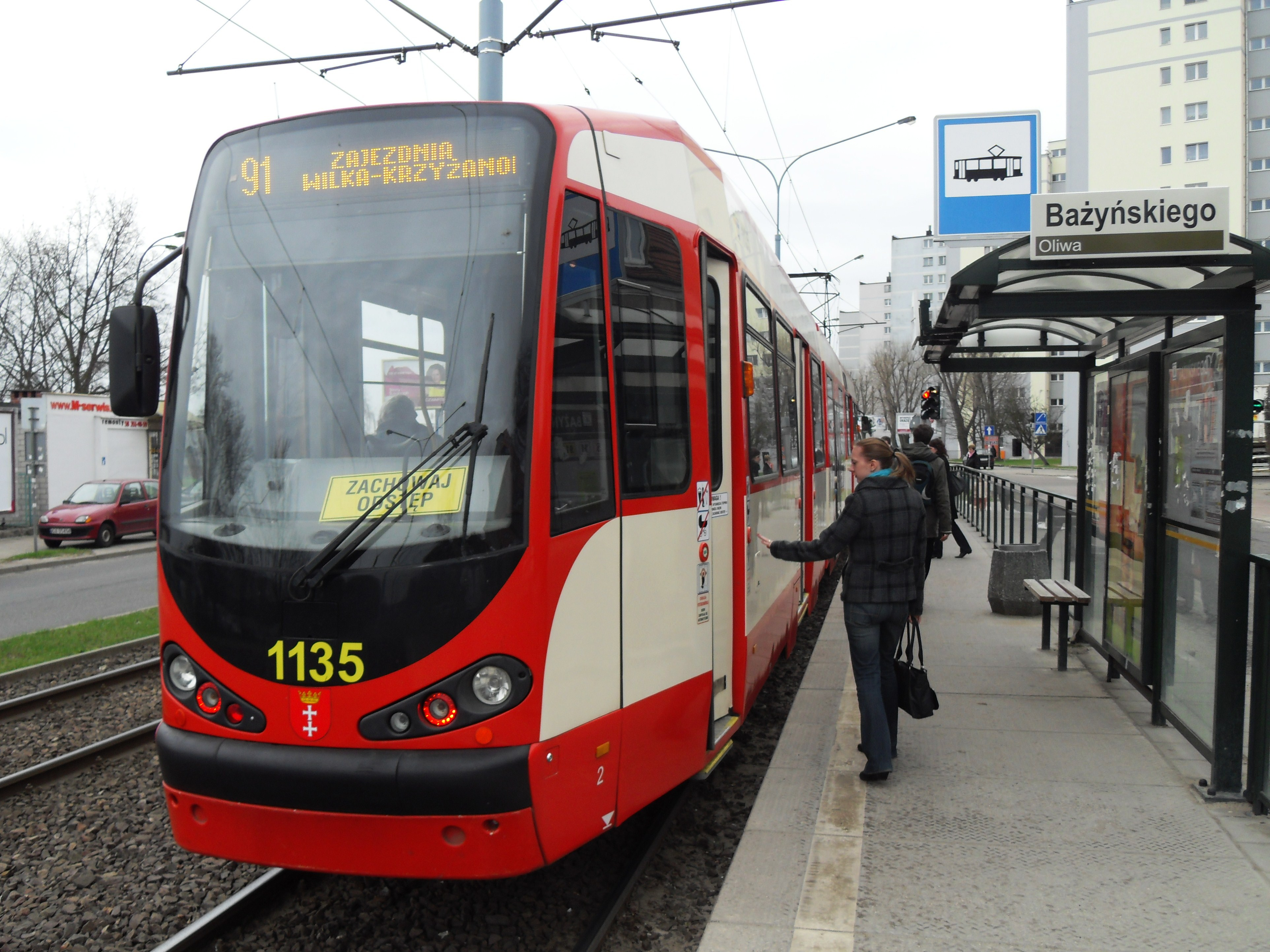 Moderus Beta w Gdańsku - linia 91 (zastępcza, w trakcie remontu torowiska).